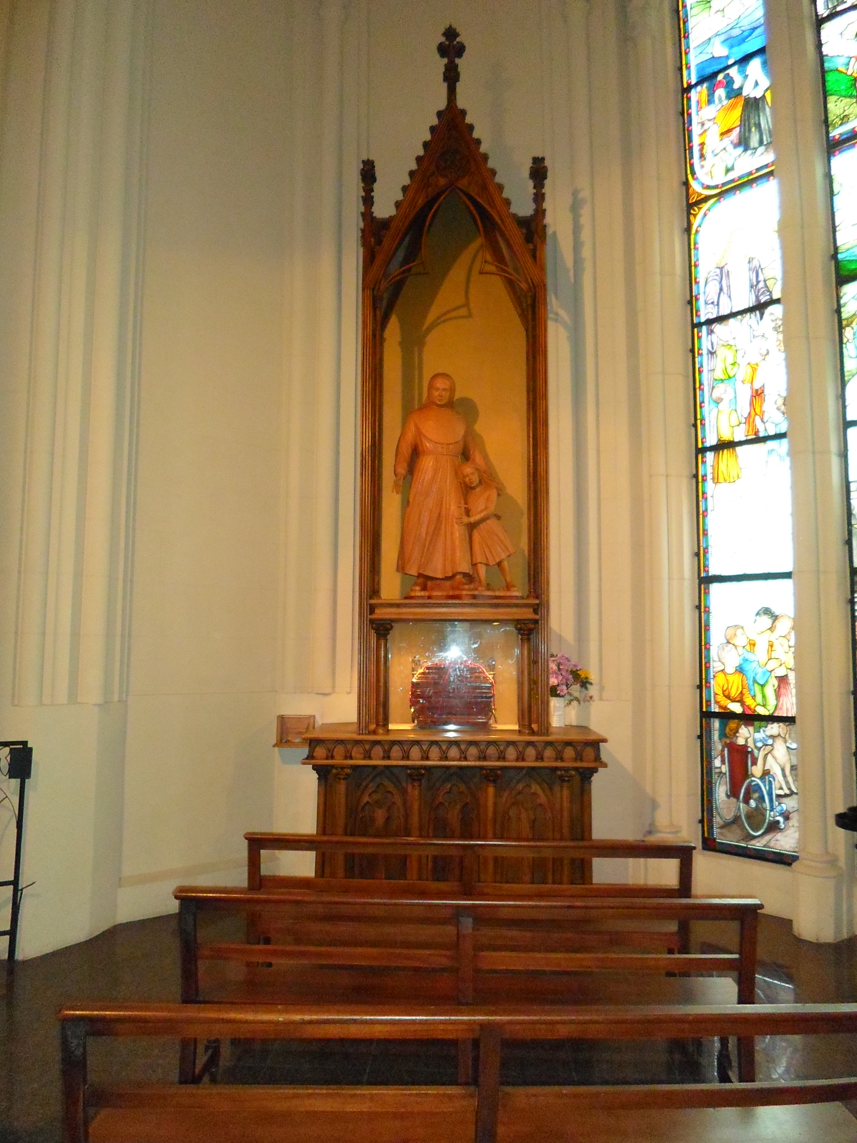 Capilla donde reposan los restos de María Ludovica de Angelis. Catedral de La Plata. Argentina